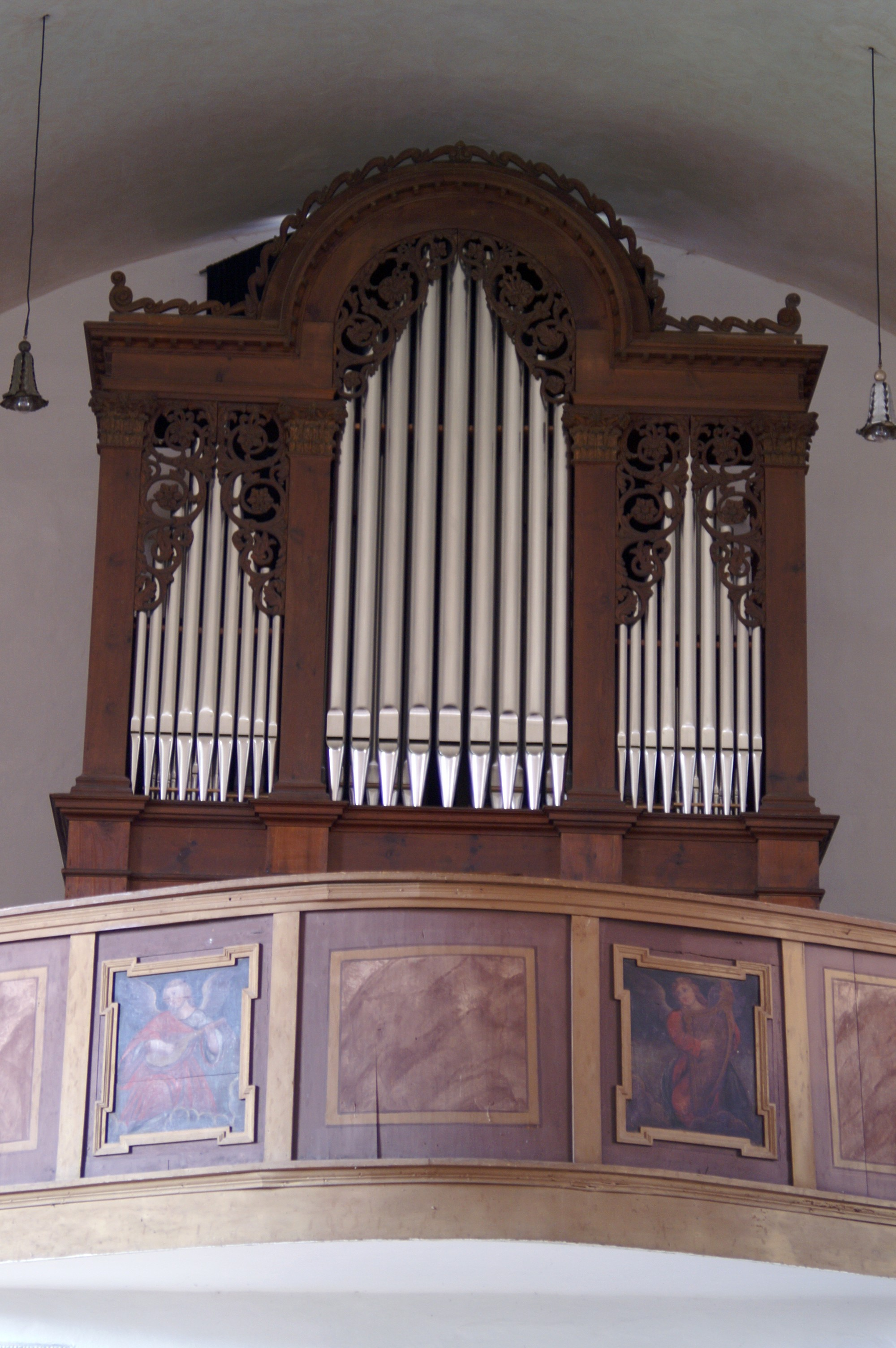 Orgel von St. Lorenz Berching, erbaut 1860 von Johann Michael Biter